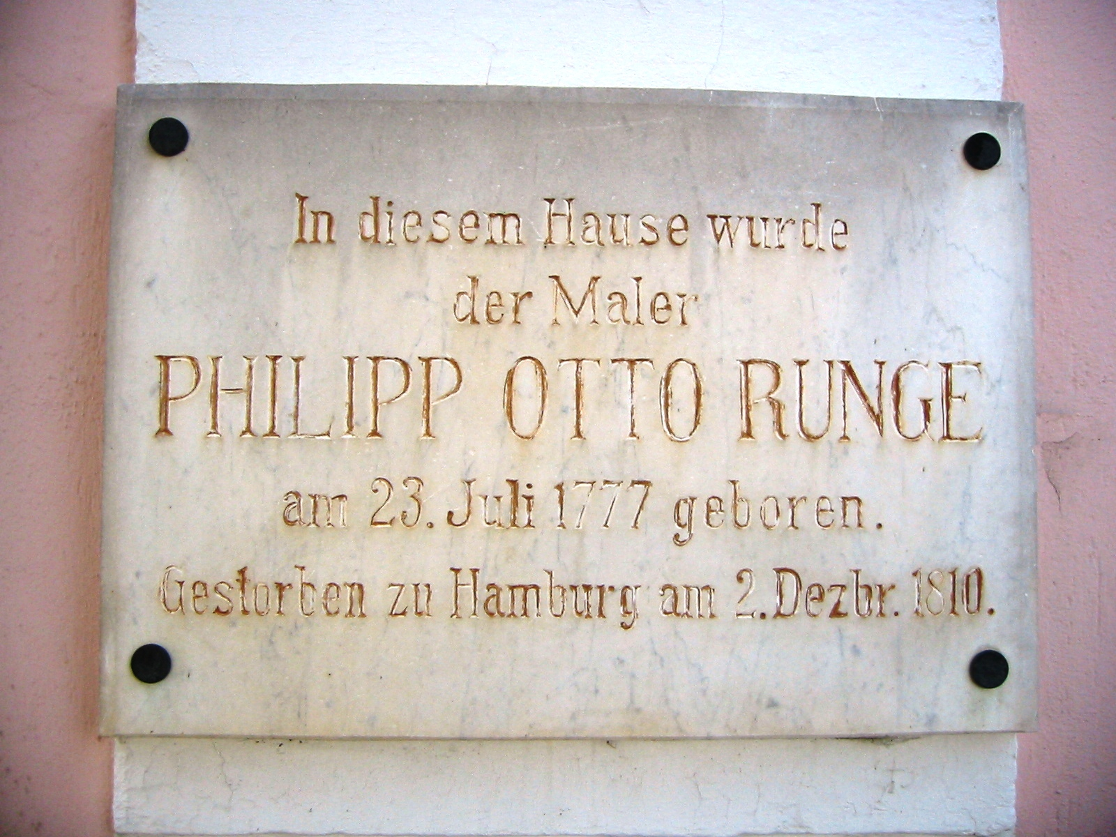 Gedenktafel für Philipp Otto Runge am gleichnamigen Rungehaus in Wolgast, Vorpommern-Greifswald (Mecklenburg-Vorpommern)